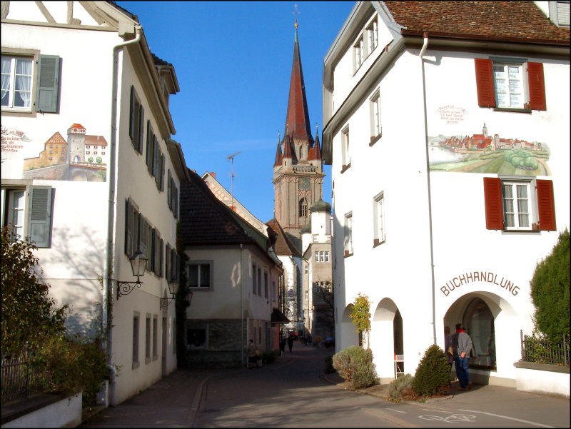 Bildbeschreibung: Obertor der Altstadt Radolfzell Fotograf/Zeichner: Peter Stein